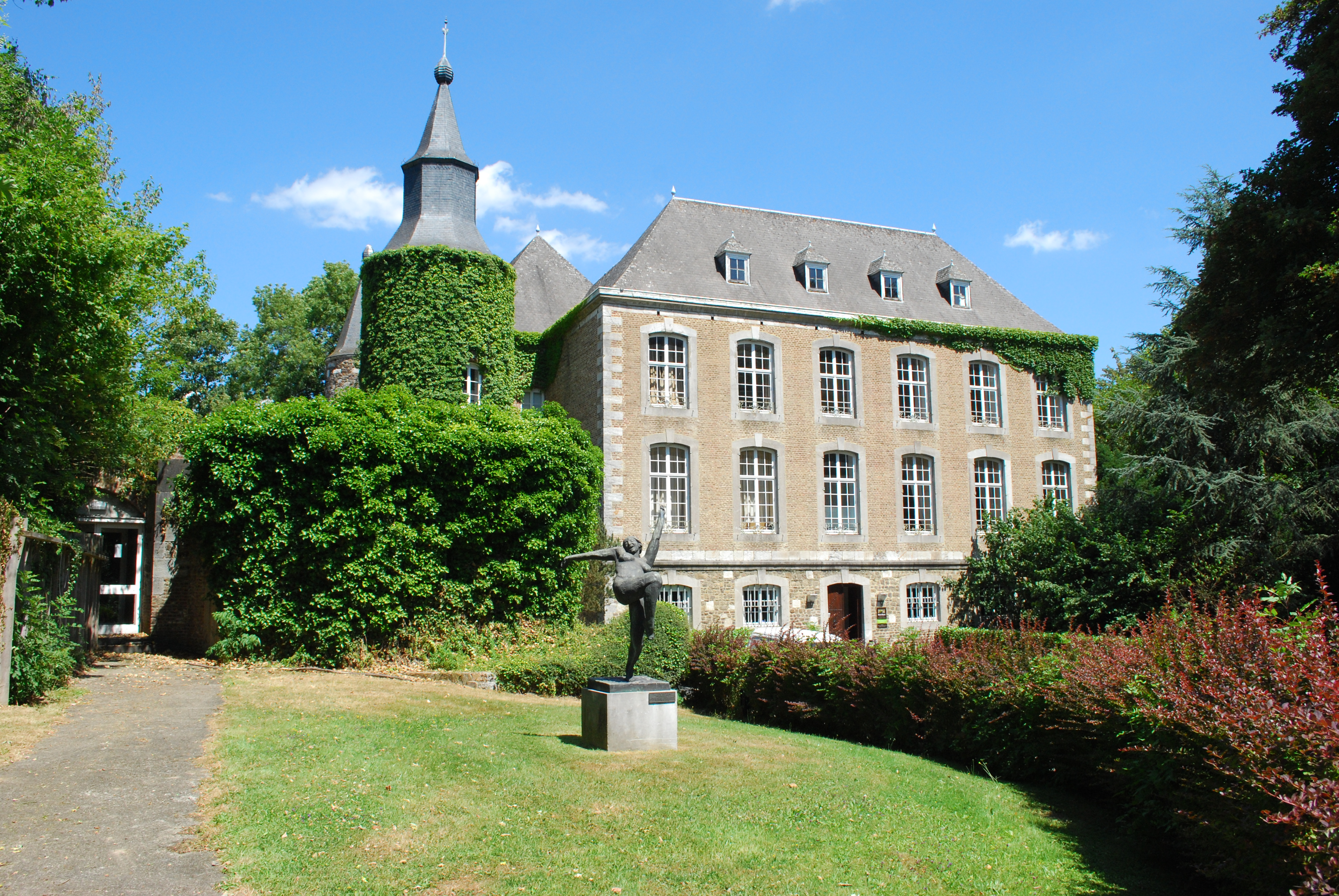 Château de Colonster (Université de Liège) : la façade sud.